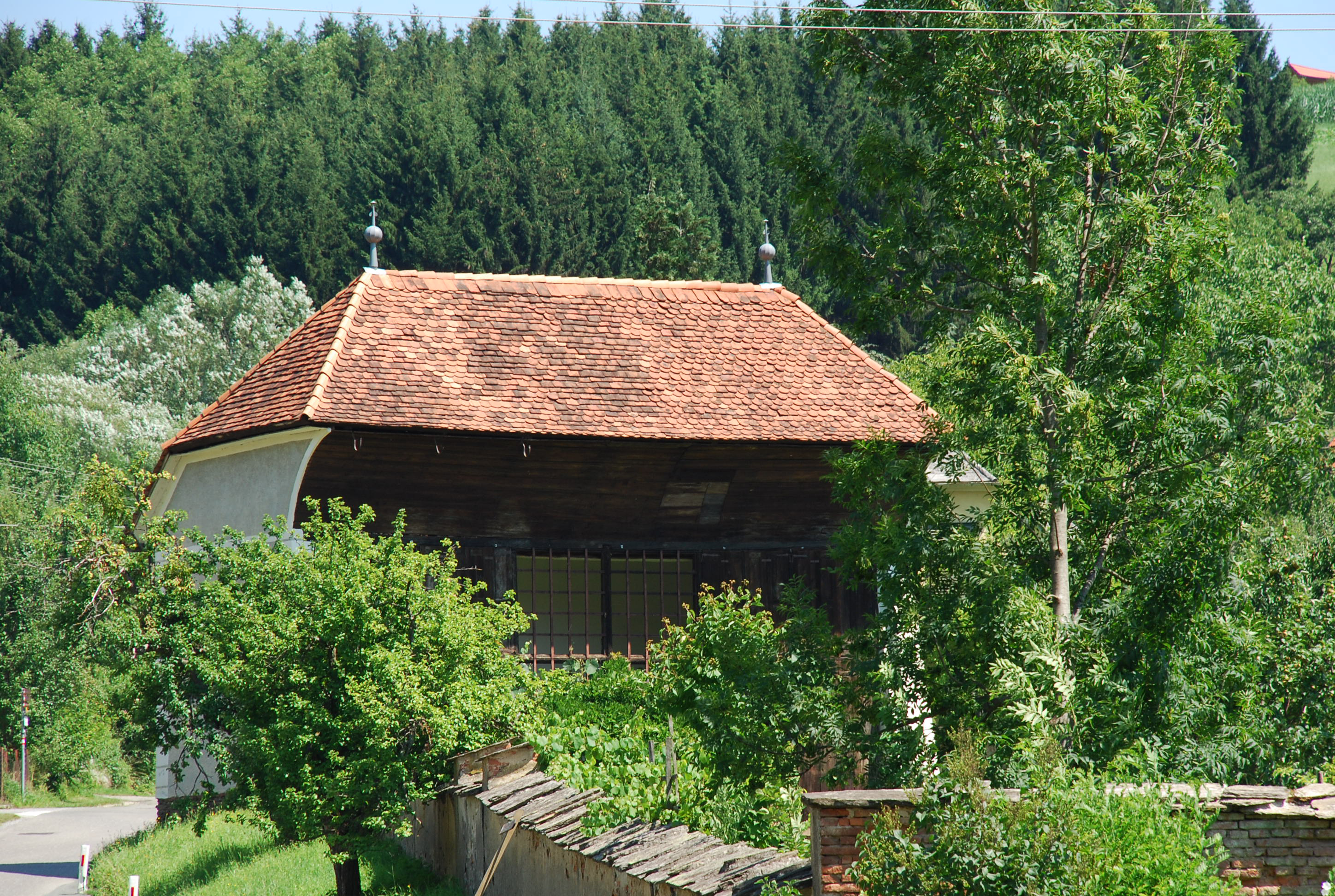 Wildbach, Steiermark, Österreich: Gartenpavillon von Schloss Wildbach